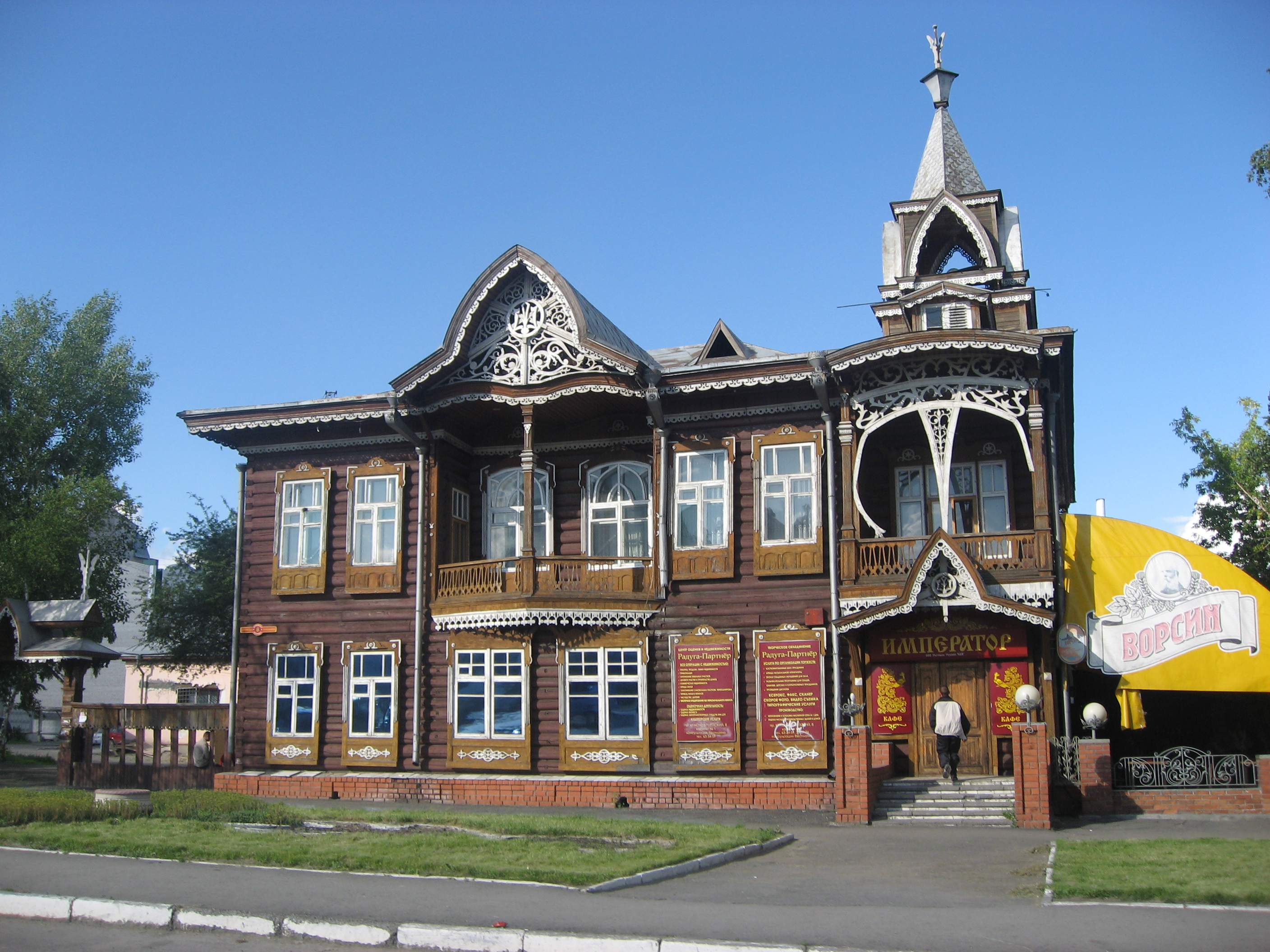 Restaurant Imperator in Barnaul